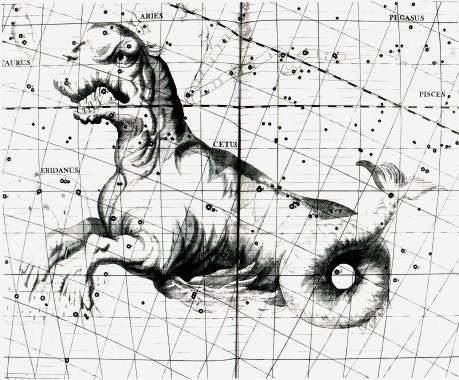 Cetus